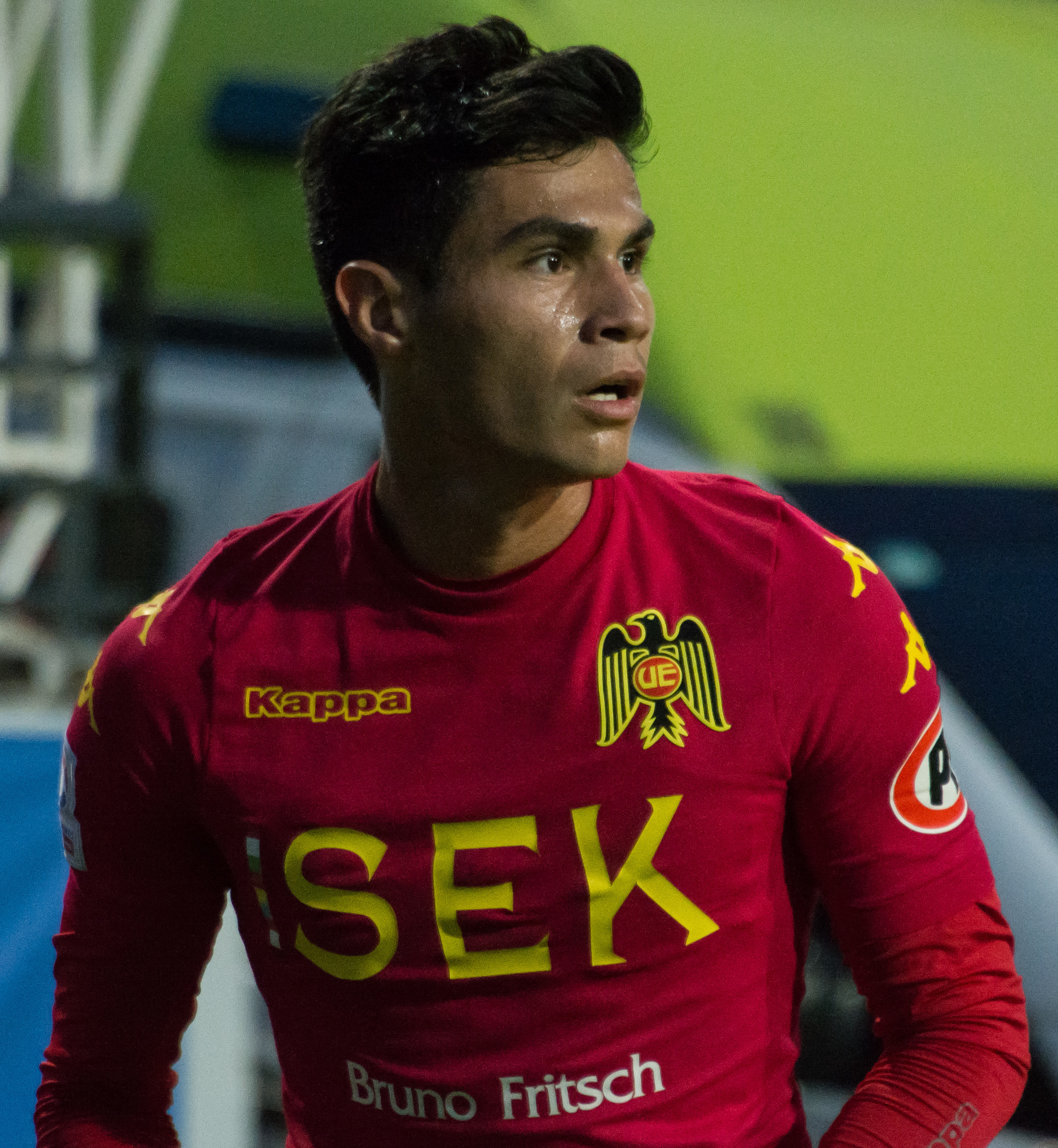 Everton v Unión Española, Estadio Sausalito, Viña del Mar, Chile.